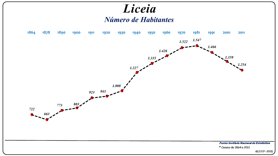 População